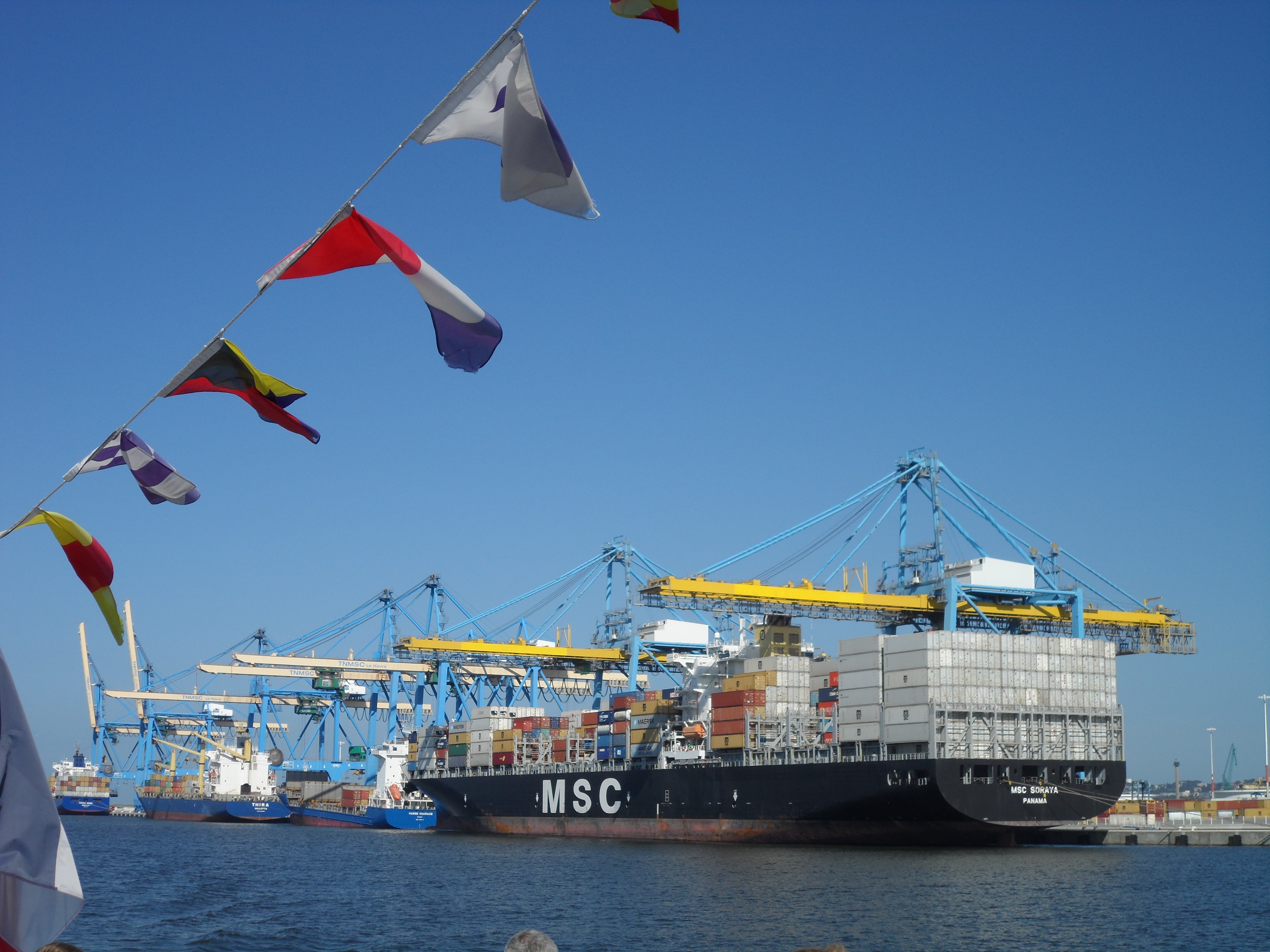 Super super container. Le Havre